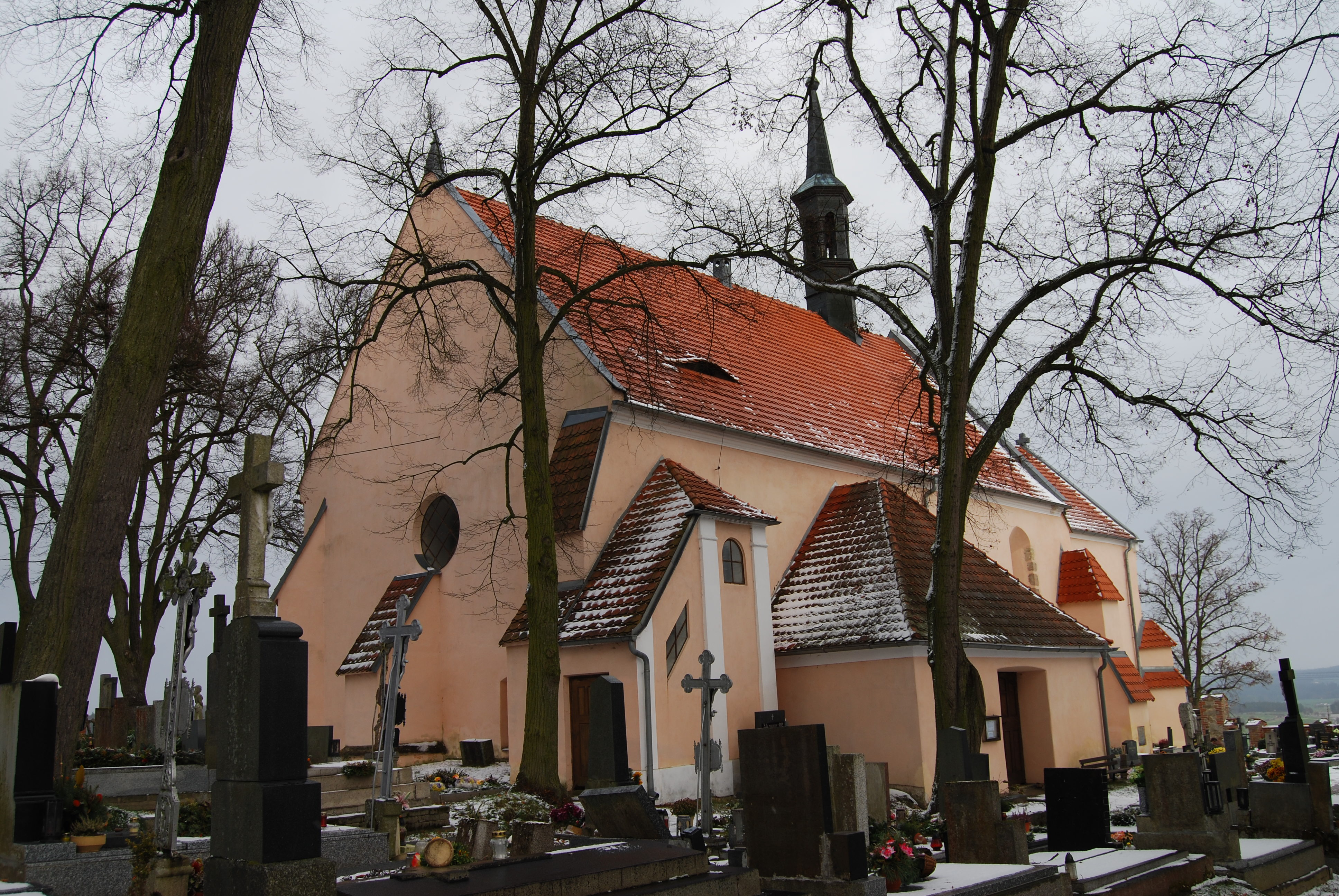 Kostel sv. Jakuba. Čížová je obec na jihu Čech, v Jihočeském kraji. Česká republika. - OpenStreetMap (Info)